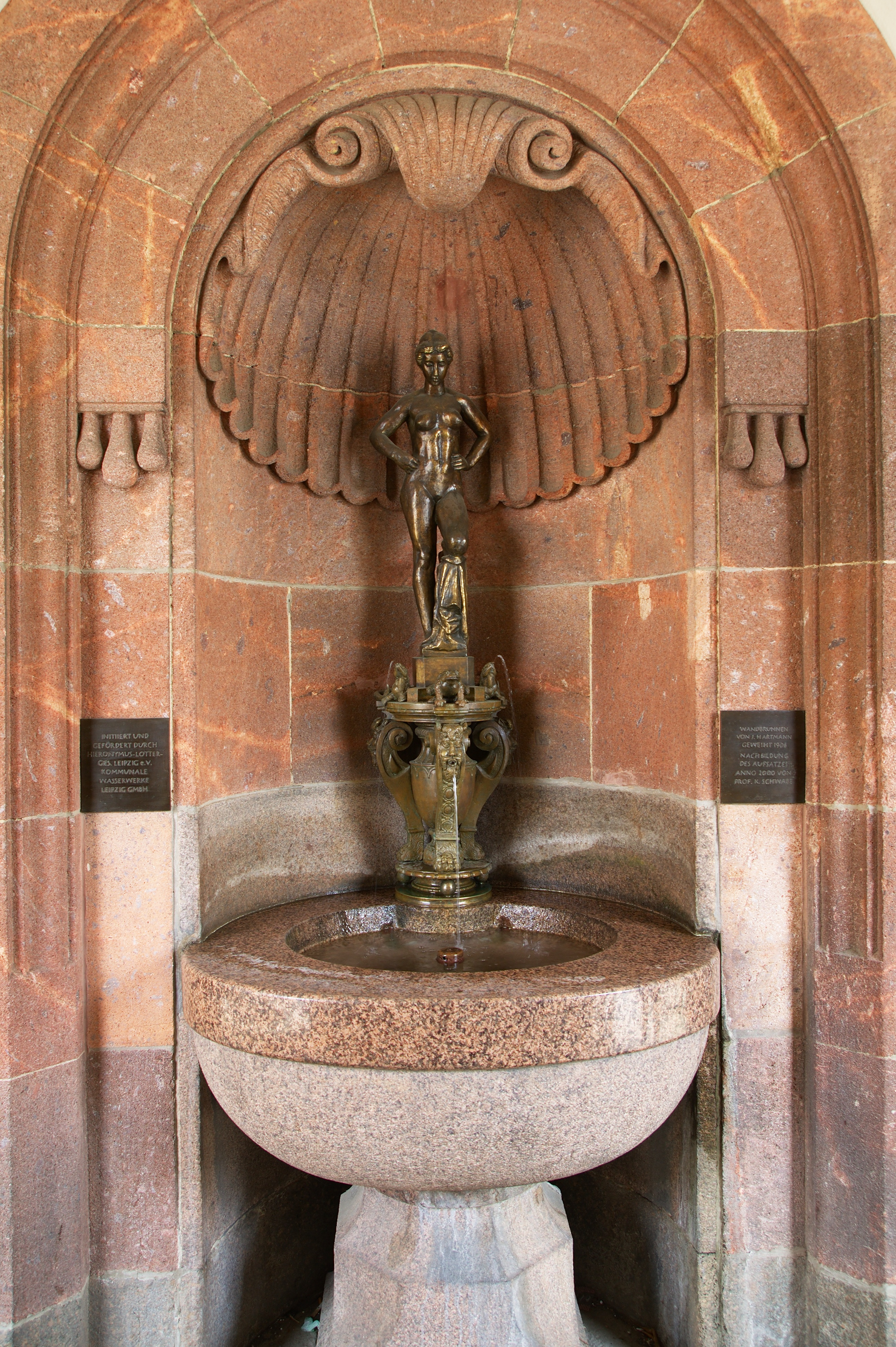 Brunnen "Badendes Mädchen" in den Rathausarkaden Leipzig 2011